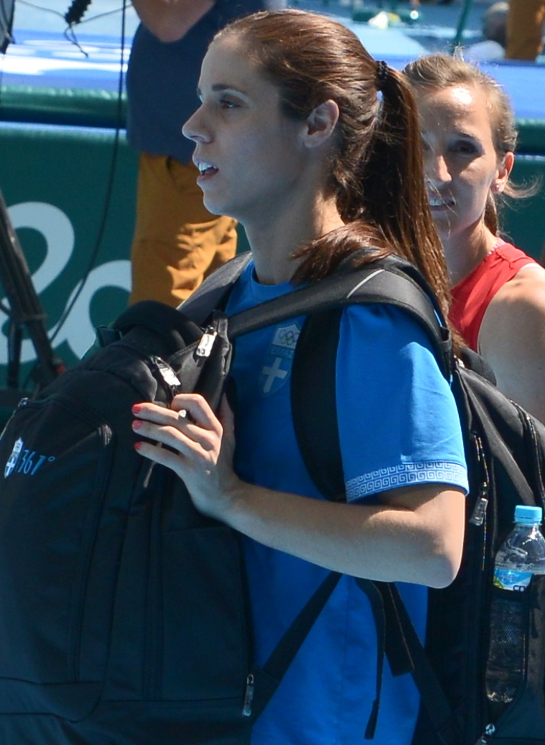 Ekateríni Stefanídi dans sa qualification au saut à la perche aux JO de Rio 2016